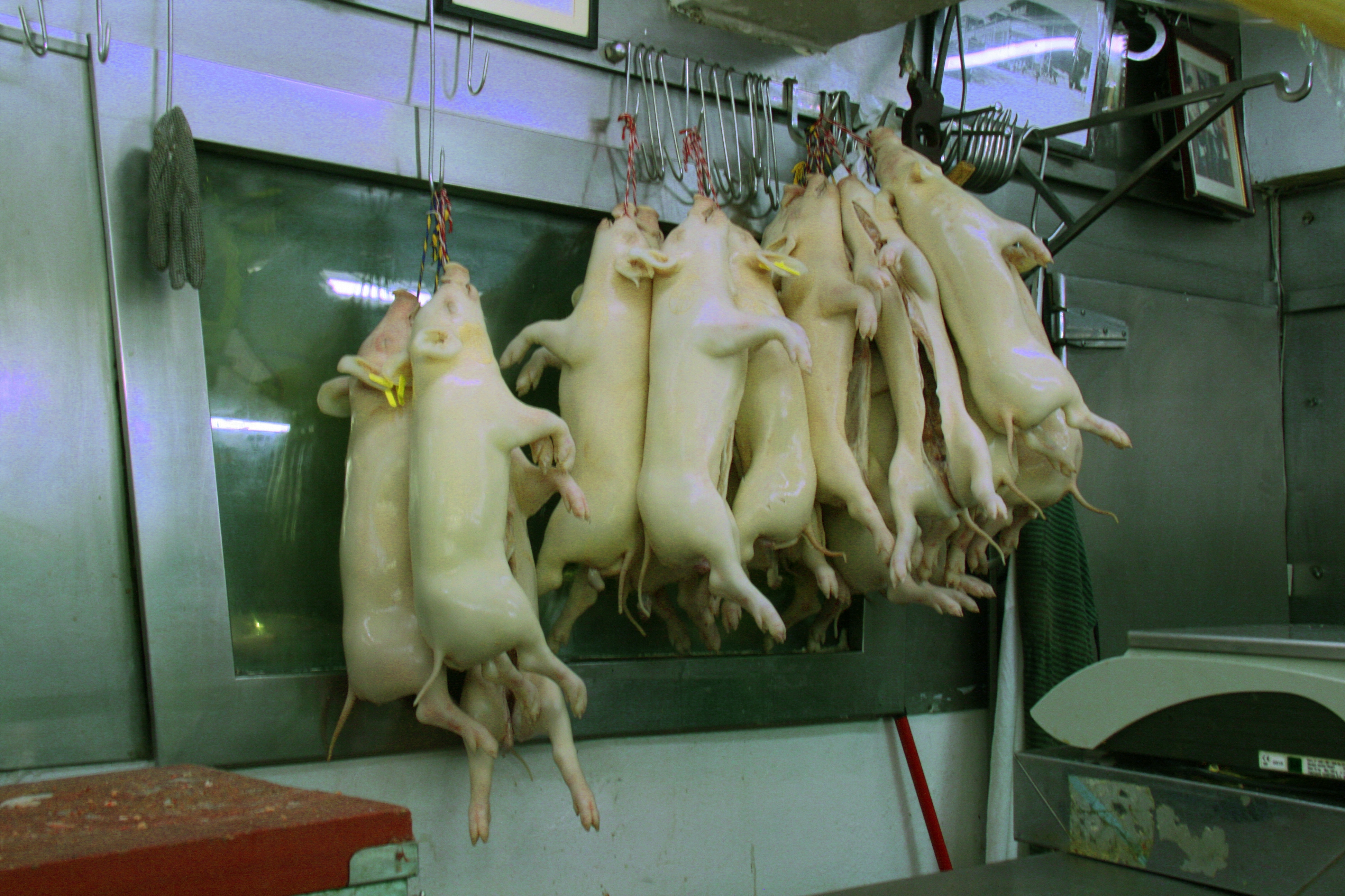 Cochinillos